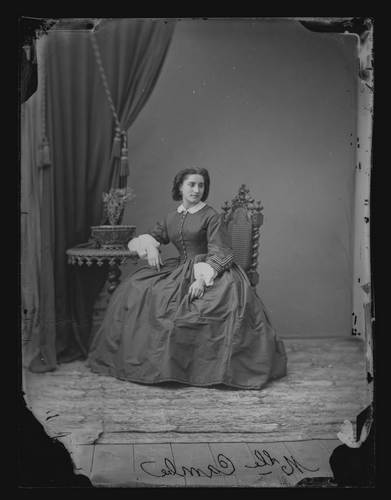 1880. Portrait en pied de Caroline Cambe (femme d'Eugène Trutat) de face assise. Bras droit sur une table, bras gauche sur les genoux, robe à manches longues, boucles d'oreilles ; vase, fleurs ; rideaux.